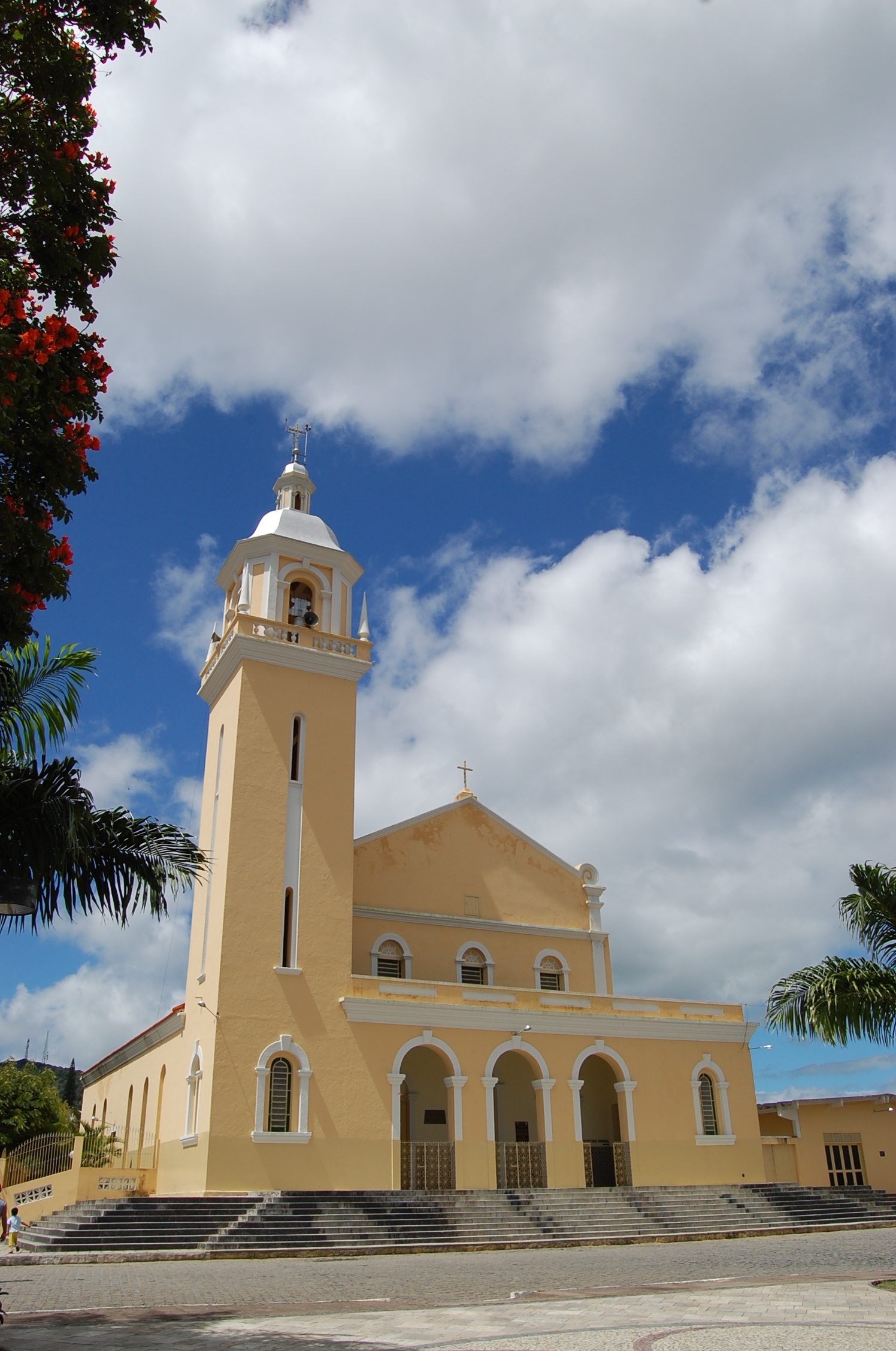 Igreja de Santo Amaro em Taquaritinga do Norte, Pernambuco, Brasil.